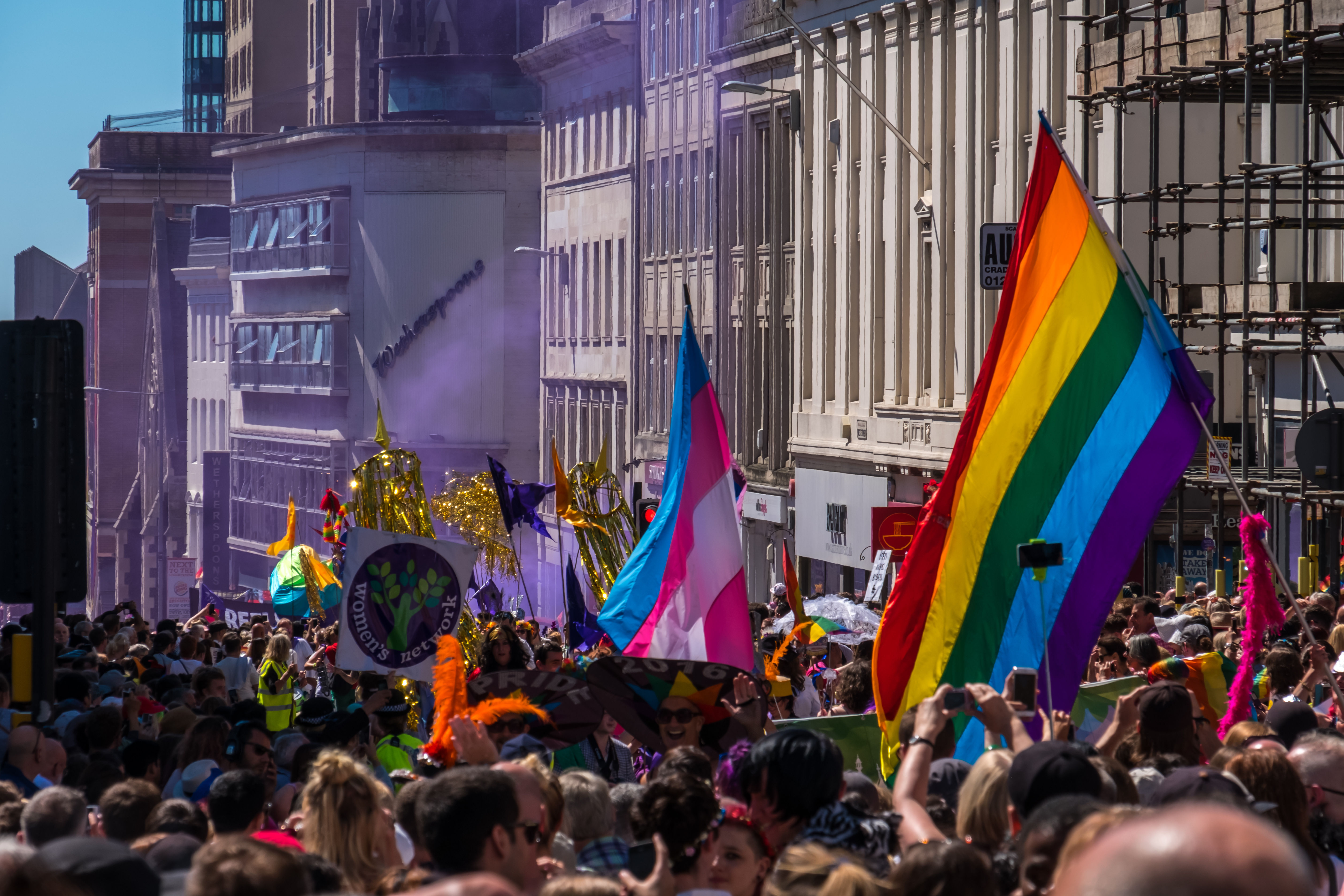 crowd